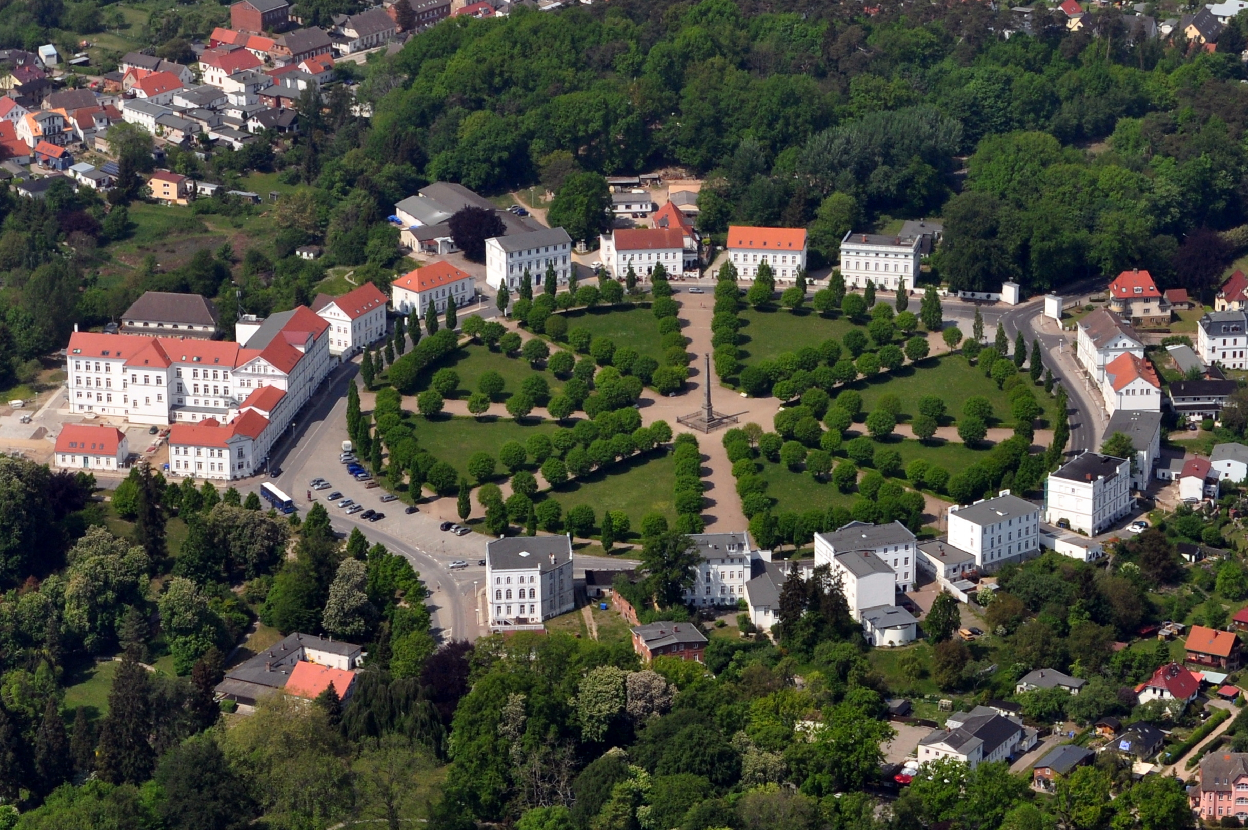 Die Bilder wurden von mir während eines einstündigen Rundflugs ab Flugplatz Güttin am 21. Mai 2011 aufgenommen. Die Bildbeschreibung steht im Dateinamen. Aufgenommen mit einer Nikon D5000 durch das Seitenfenster des Flugzeugs.